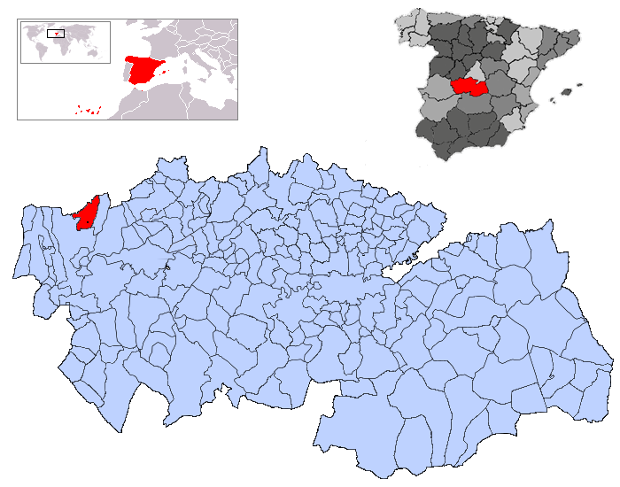 Navalcán en la provincia de Toledo.